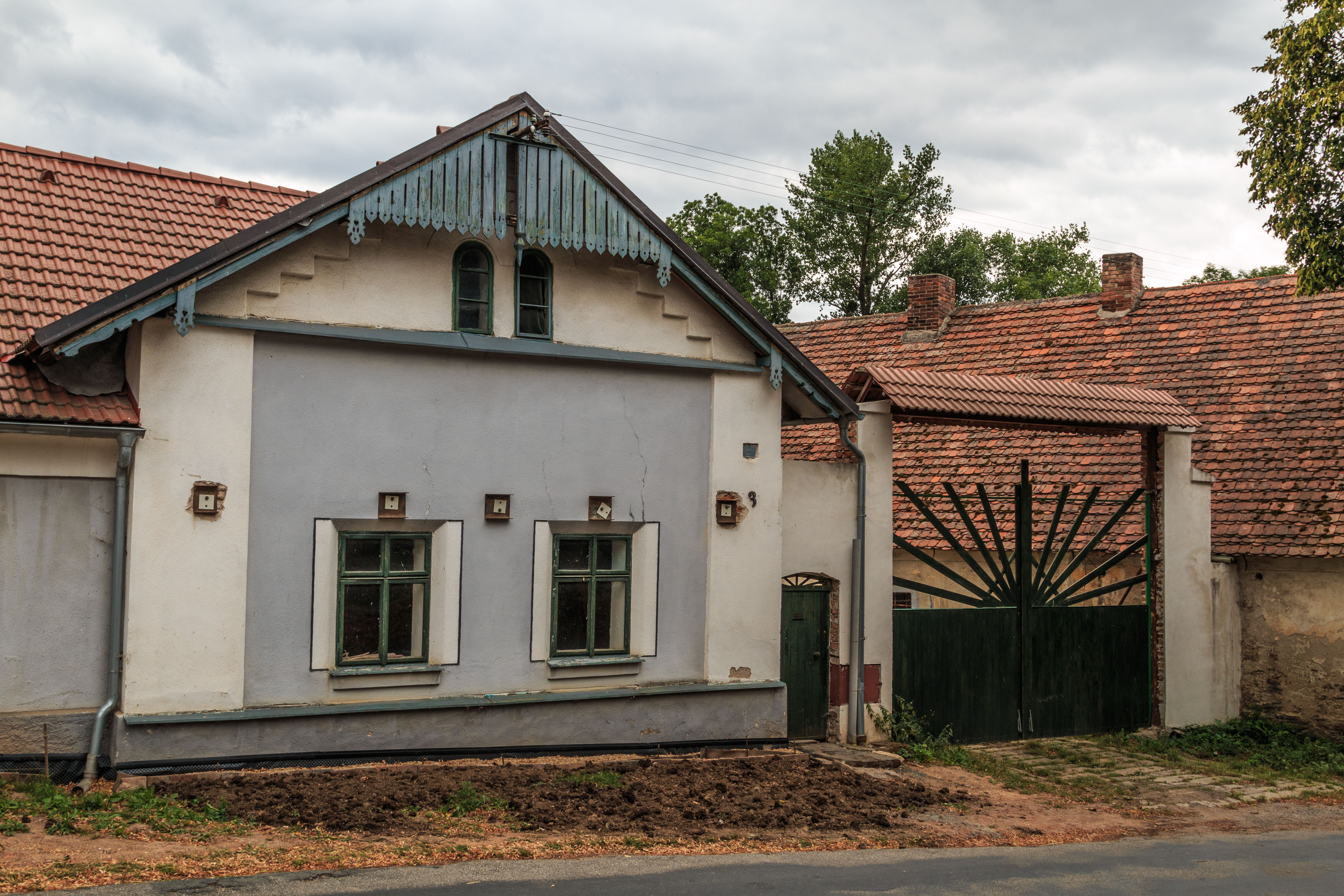 Zehuby čp. 3